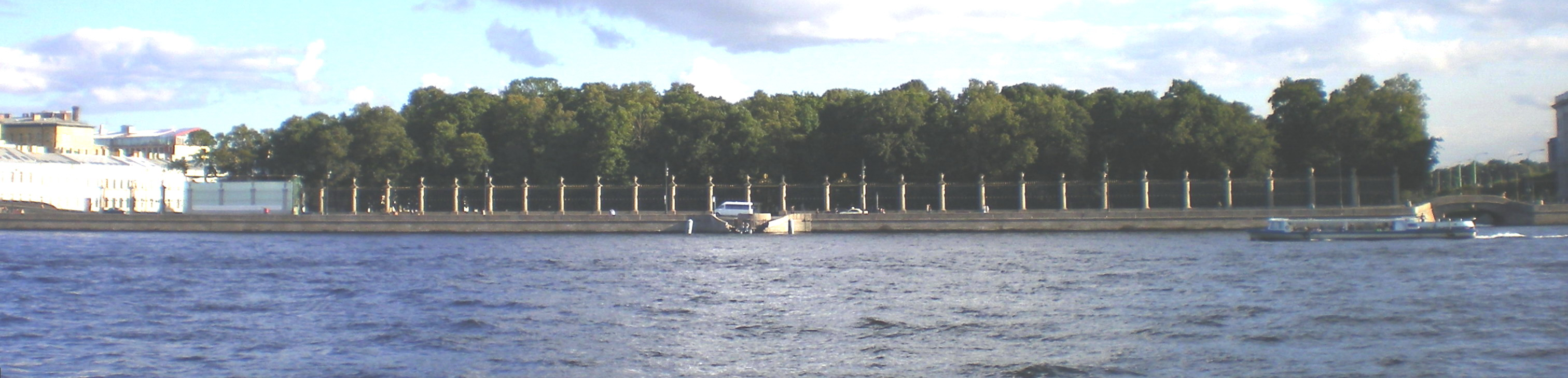 Дворцовая набережная и Летний сад, вид с Невы.